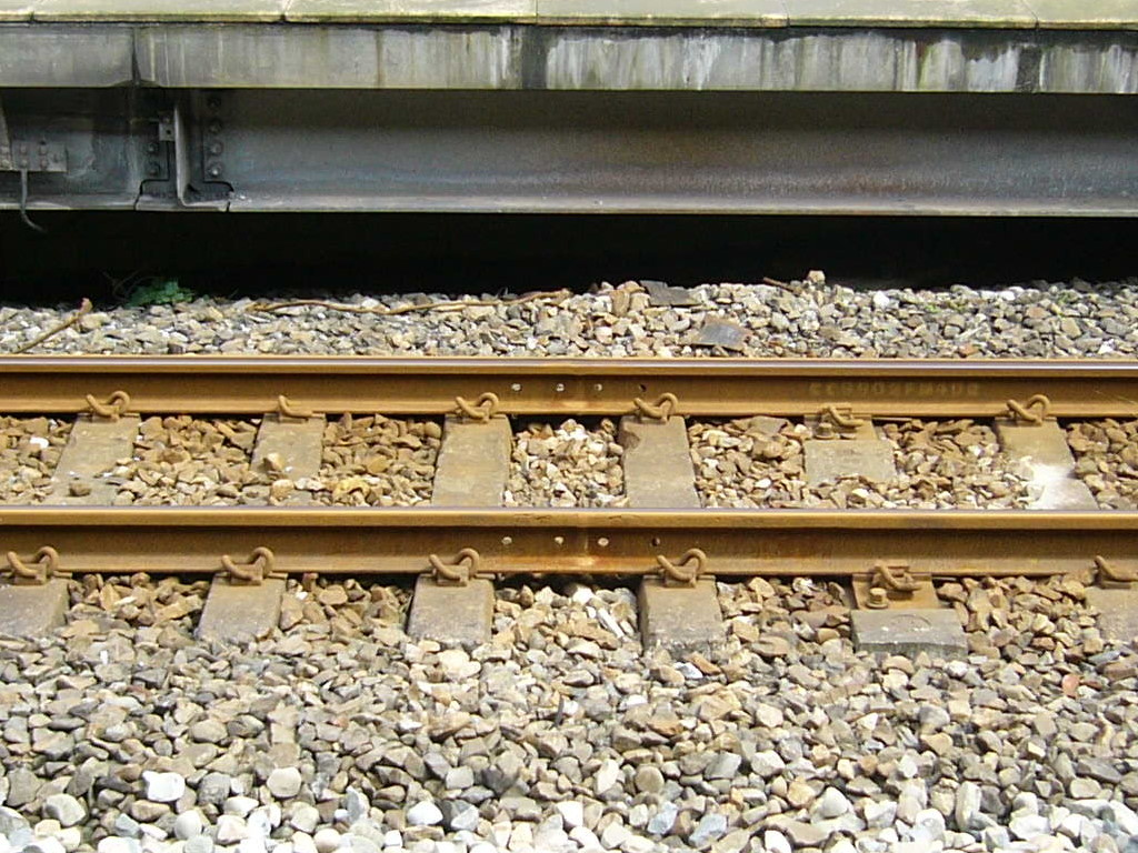 臺灣鐵路管理局百福車站第一月台側，無縫焊接鐵軌。